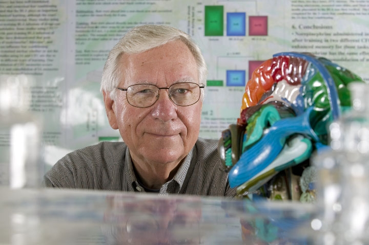 James L. McGaugh